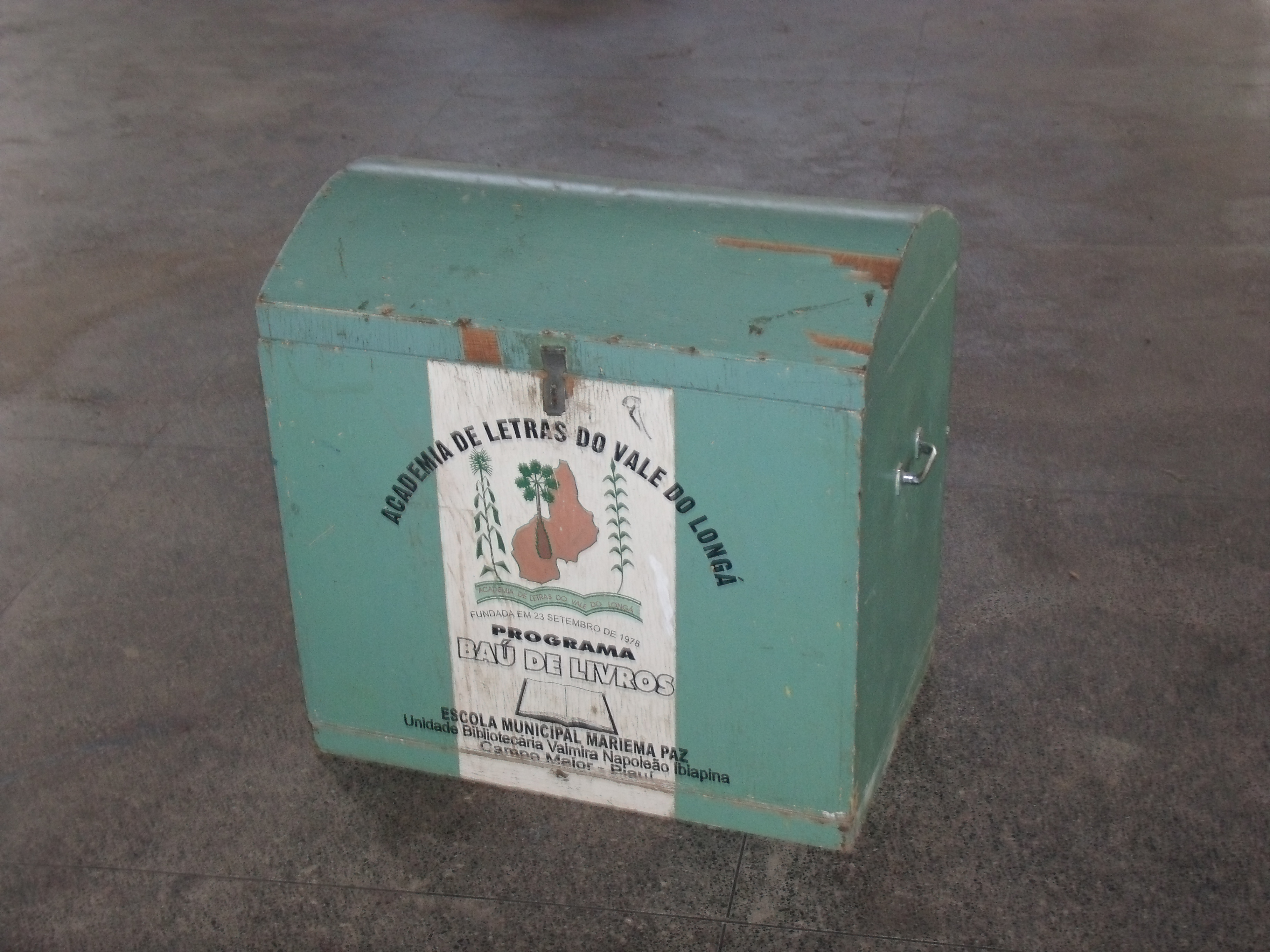 Baú de livros da Academia de Letras do Vale do Longá, como unidade bibliotecária de literatura piauiense em escola pública do Piauí.